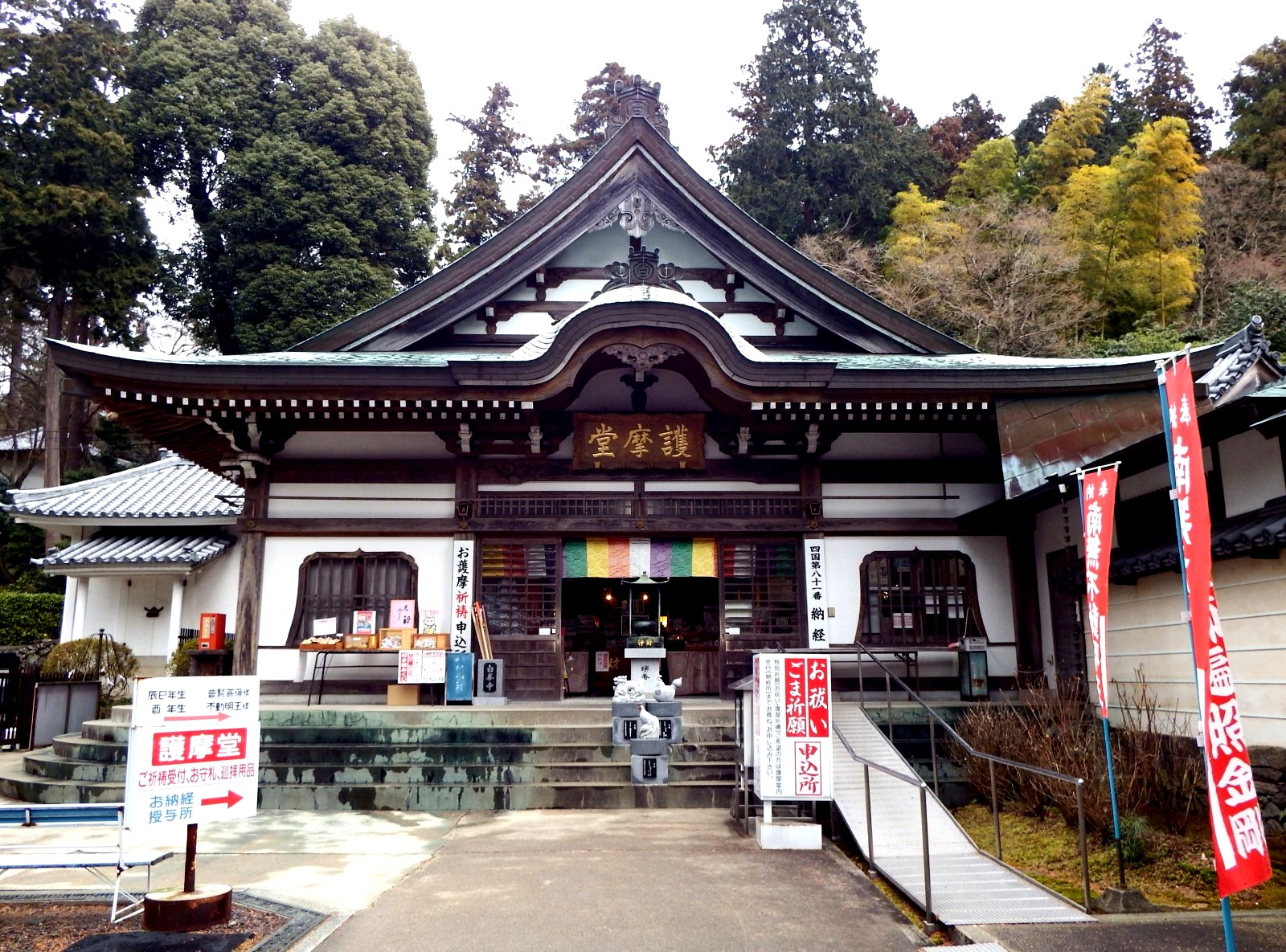 白峯寺の護摩堂